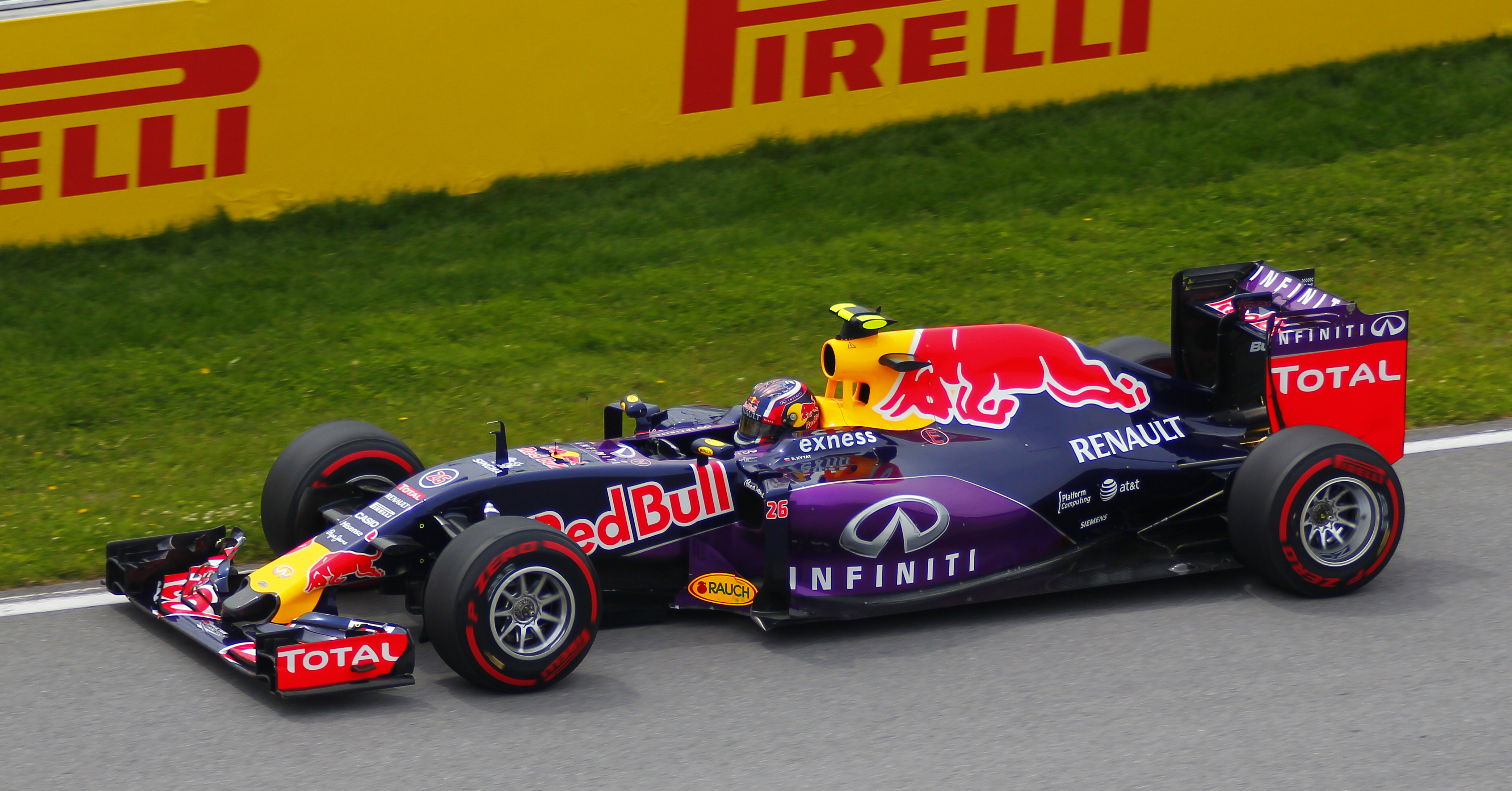 Daniil Kvyat - Red Bull Racing - Grand Prix du Canada - Circuit Gilles-Villeneuve - 7 juin 2015 (Photo Paul-Émile Poulin-Jacques)